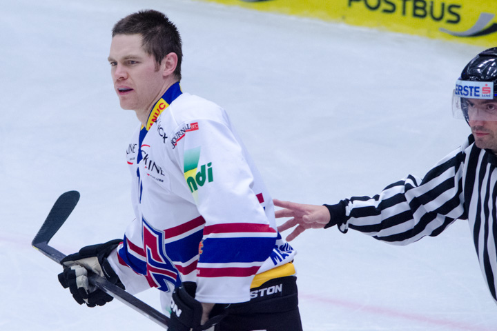 _DSC5240.jpg